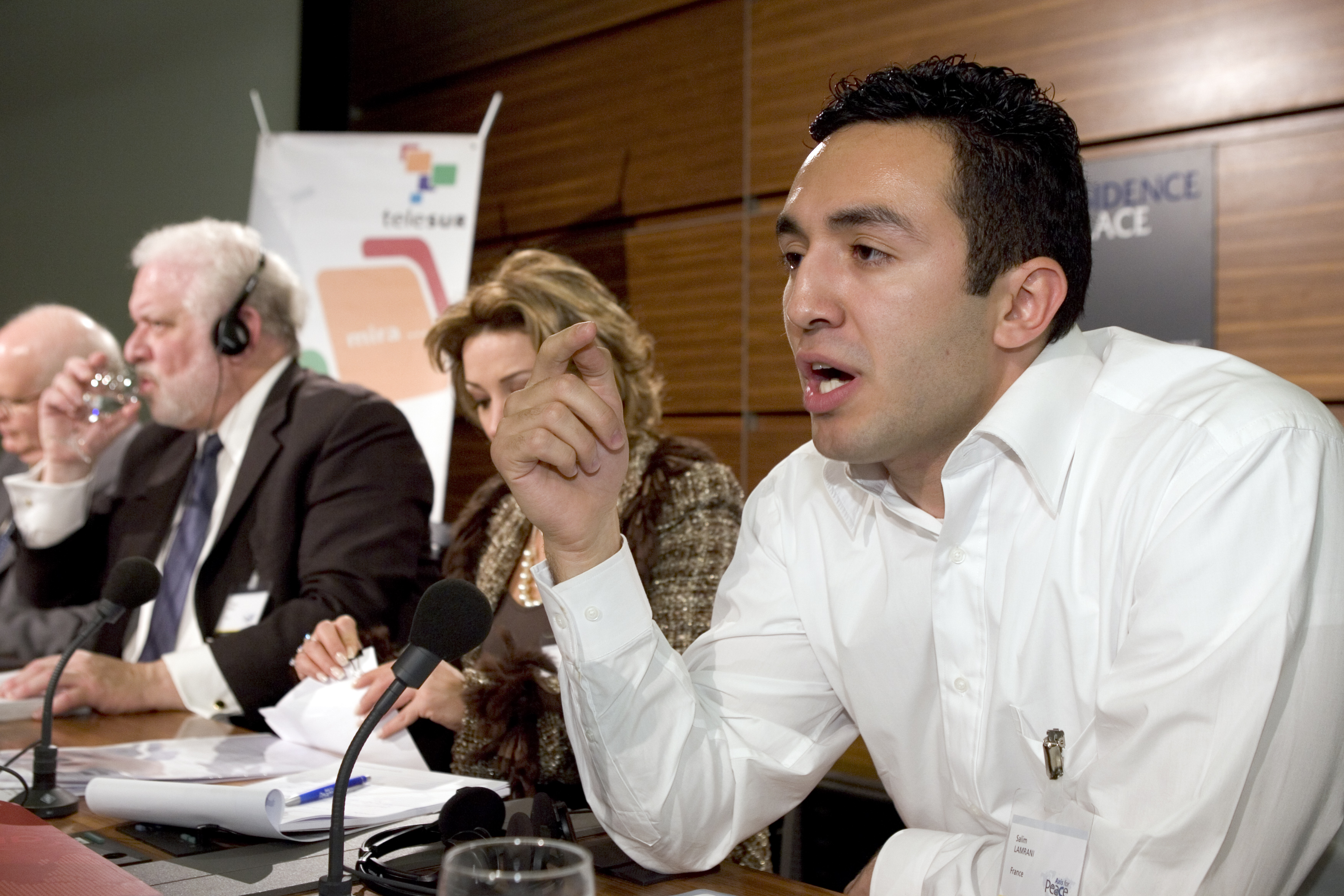 Salim Lamrani, enseignant, écrivain et journaliste français, spécialisé sur les relations entre Cuba et les États-Unis.